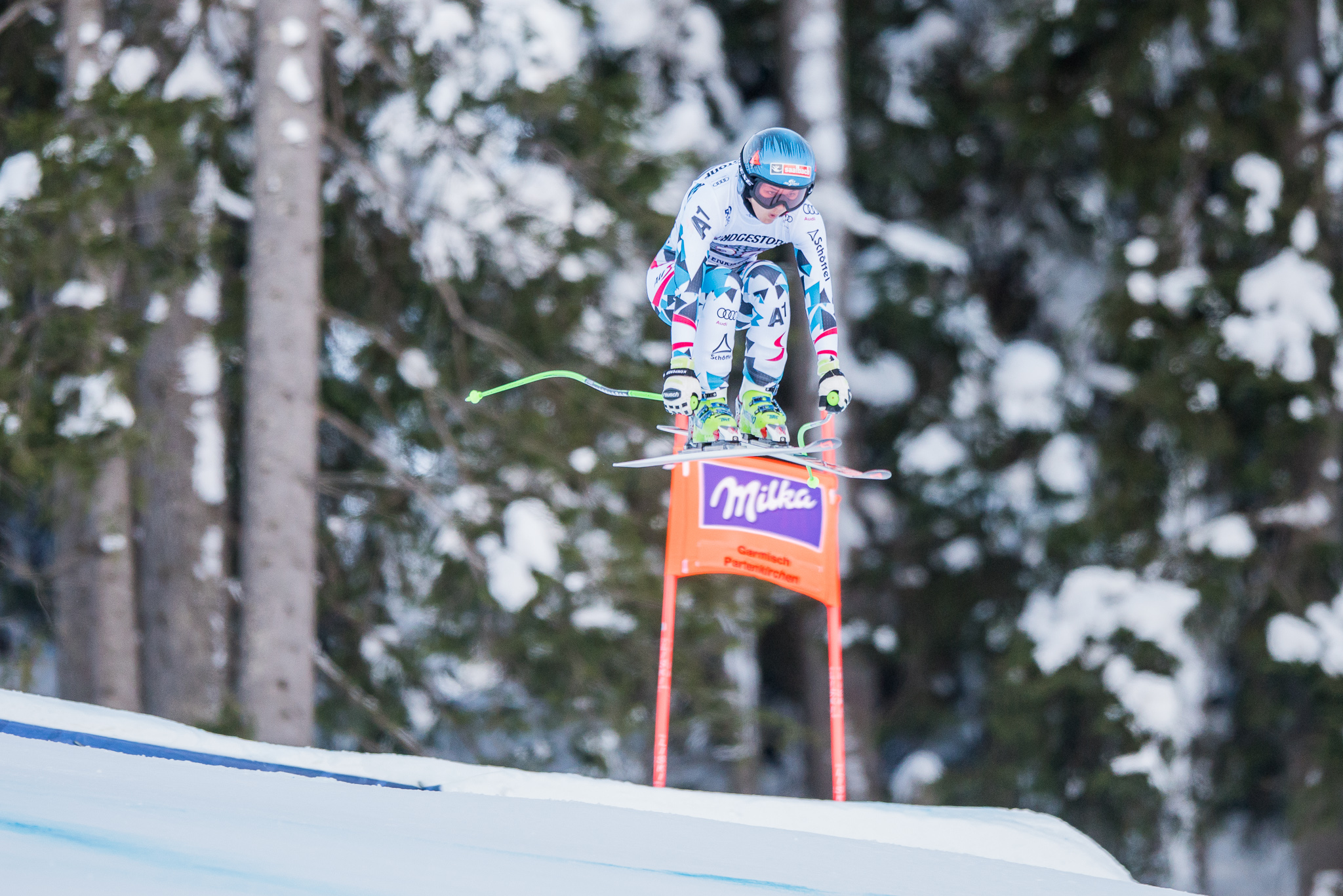 64. Kandahar Rennen,Audi FIS Ski Weltcup Garmisch-Partenkirchen,Damen Abfahrt,Kandahar,Ladies Downhill,Sabrina Maier